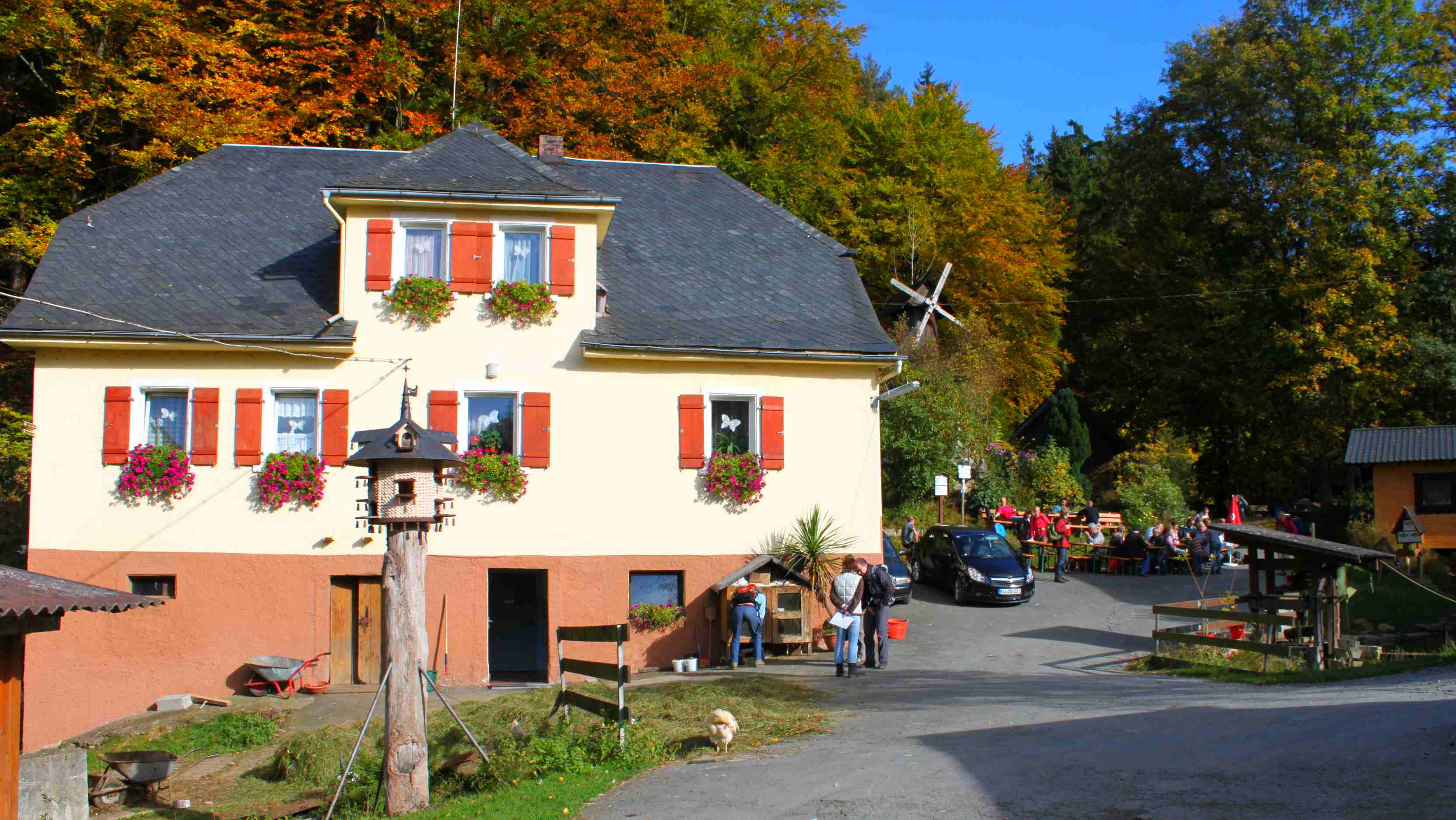 Fischzucht und Ausflugswirtshaus Kleinrehmühle